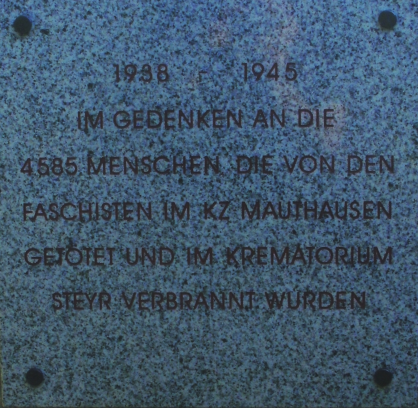 NS-Mahnmal (Urnenfriedhof am Tabor), Steyr, Österreich